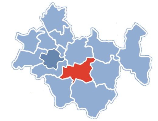 Położenie gminy Kobiele Wielkie na terenie powiatu radomszczańskiego.